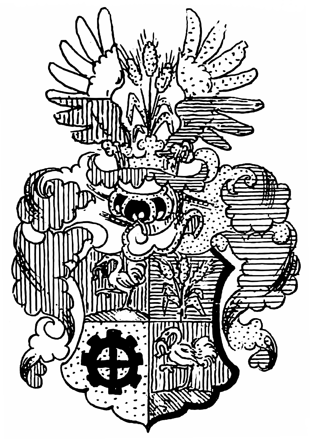 Wappen der Mayr von Melnhof 1